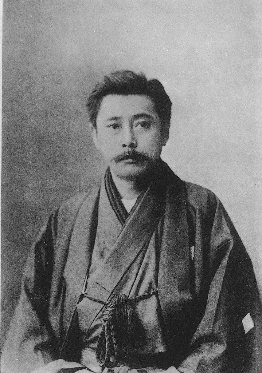 Portrait of Kuga Katsunan (陸羯南, 1857 – 1907)